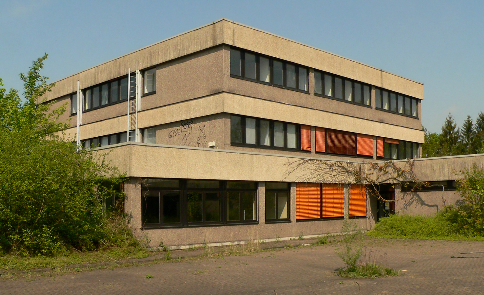 PATVN Wennigser Mark